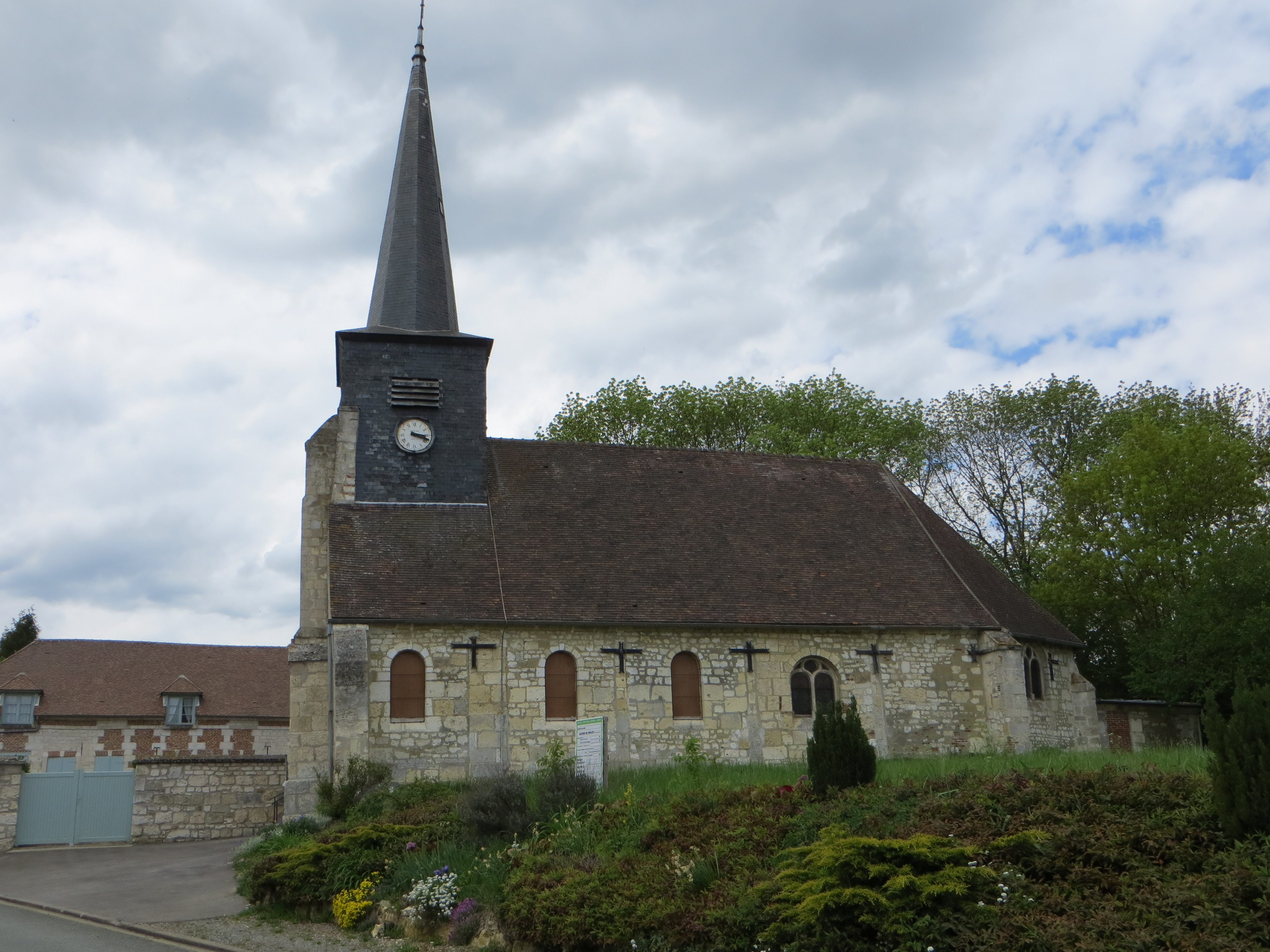 Vue générale de l'église